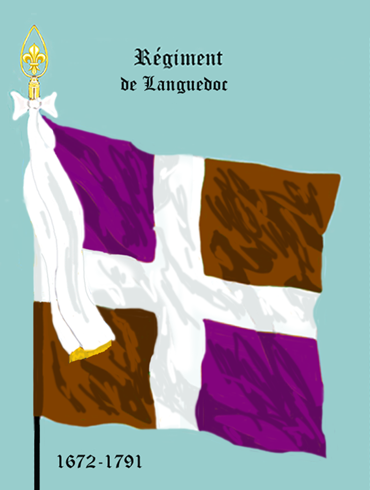 Ordonnanzfahne eines königlich französischen Infanterie-Regiments. - Entnommen und überarbeitet aus: „LES UNIFORMES ET LES DRAPEAUX DE L'ARMÉE DU ROI“ Marseille 1899. (Drapeau d'Ordonnance d' un régiment française d'infanterie royale.)